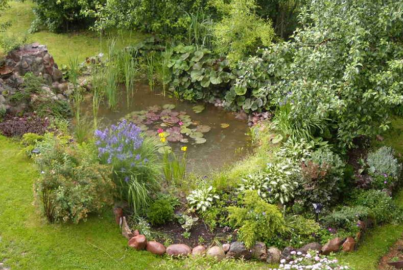 Efektowny staw foliowy z bujną i zróżnicowaną roślinnością